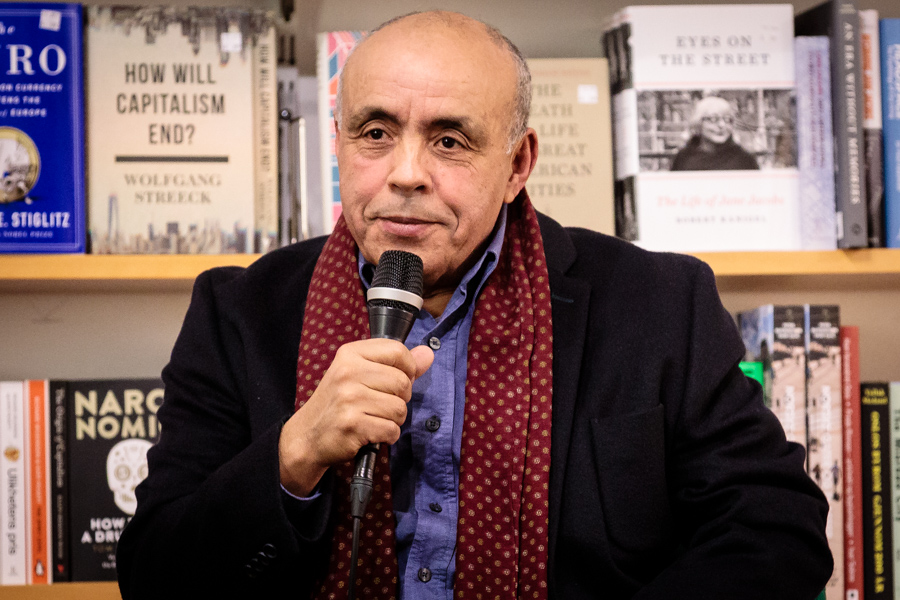 Miloud Guiderk på boklansering av "Grenseløse opplevelser" på Tronsmo bokhandel den 08.11.2017. Arrangementet markerte starten på 25-årsjubileet til Cosmopolite. På scenen: Guttorm Andreasen (vert), Anne Ellingsen (forfatter), Arne Berg (gjest), Jan Ole Otnæs (gjest), Miloud Guiderk (gjest), Omar Guiderk (gjest) og Ivan Mazuze (saksofon).